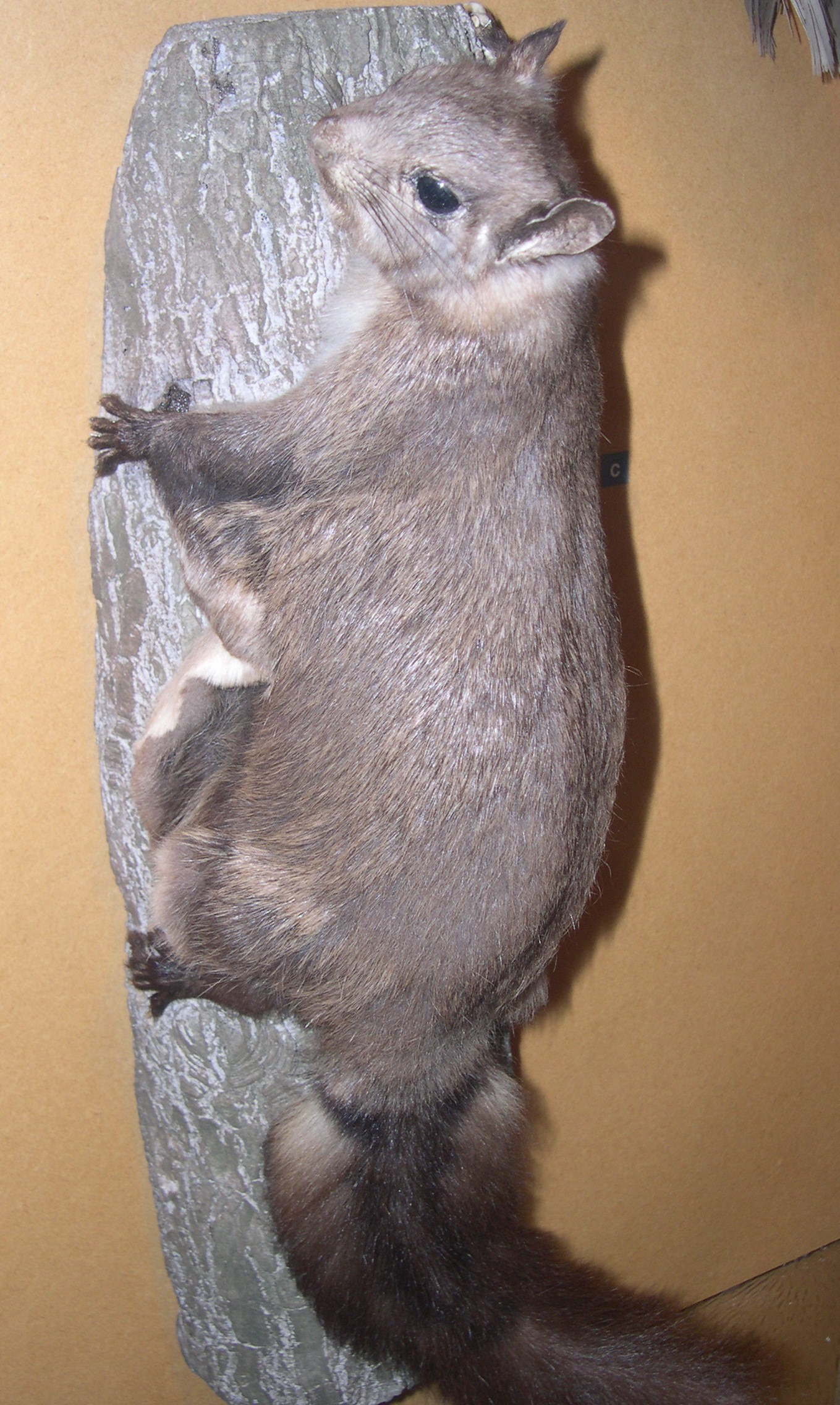 Een opgezet exemplaar van Hylopetes nigripes in het Museon in Den Haag